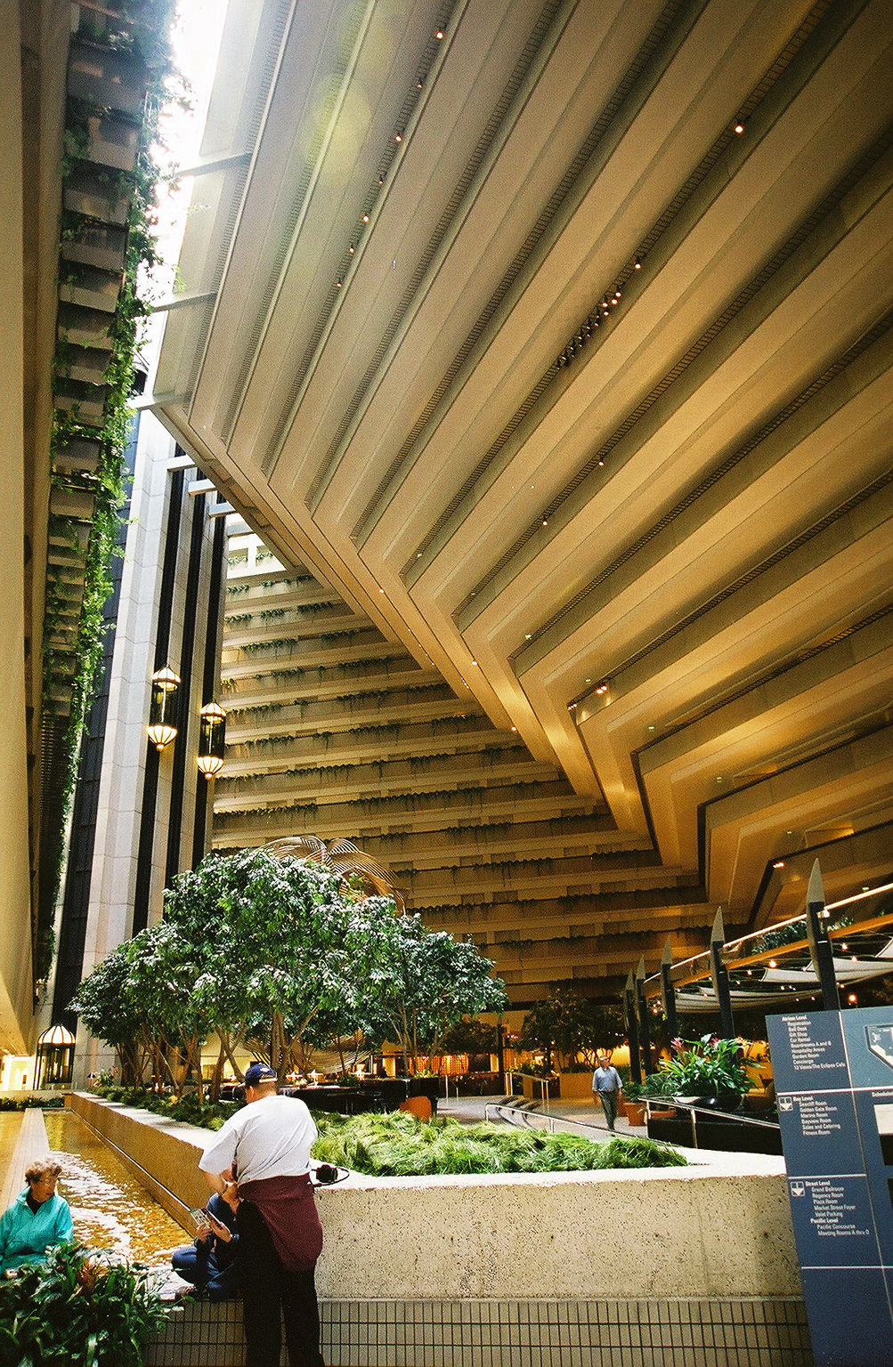 Embarcadero Hyatt Atrium, San Francisco